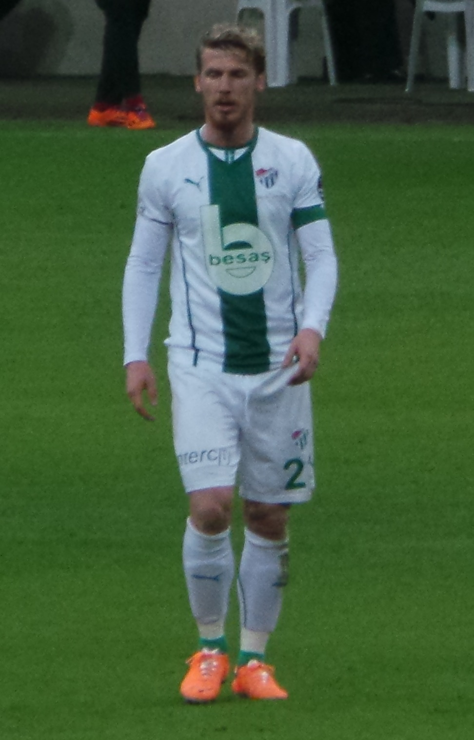 Serdar Aziz vs G.S. in 2014